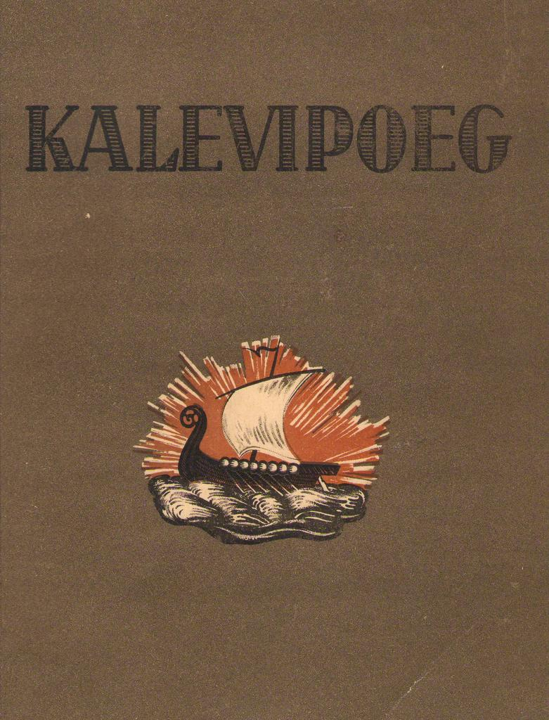 Eesti rahvuseepos "Kalevipoeg", 1935